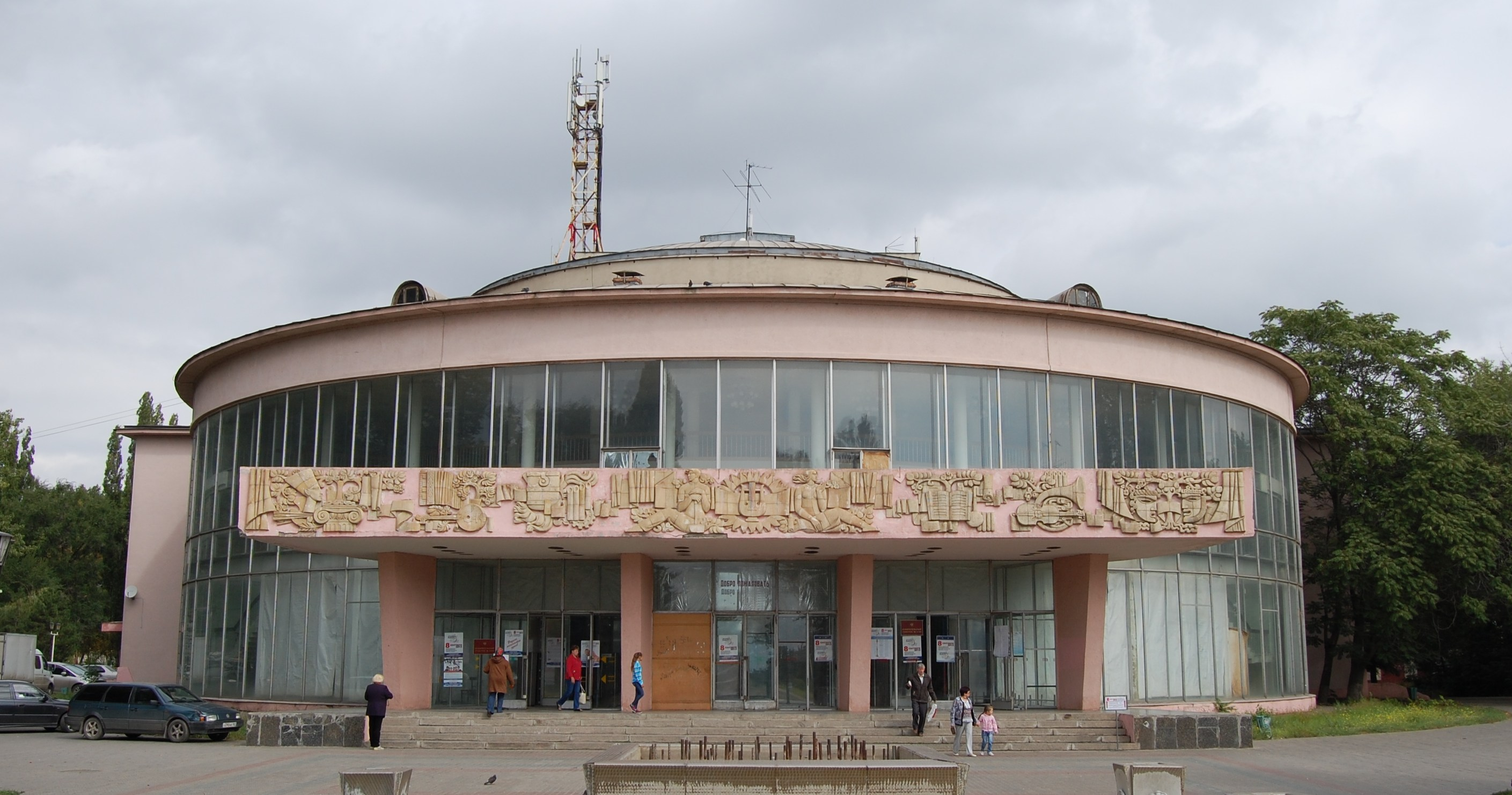 Художник Бывший Дворец культуры и техники имени В. И. Ленина, (Таганрог)